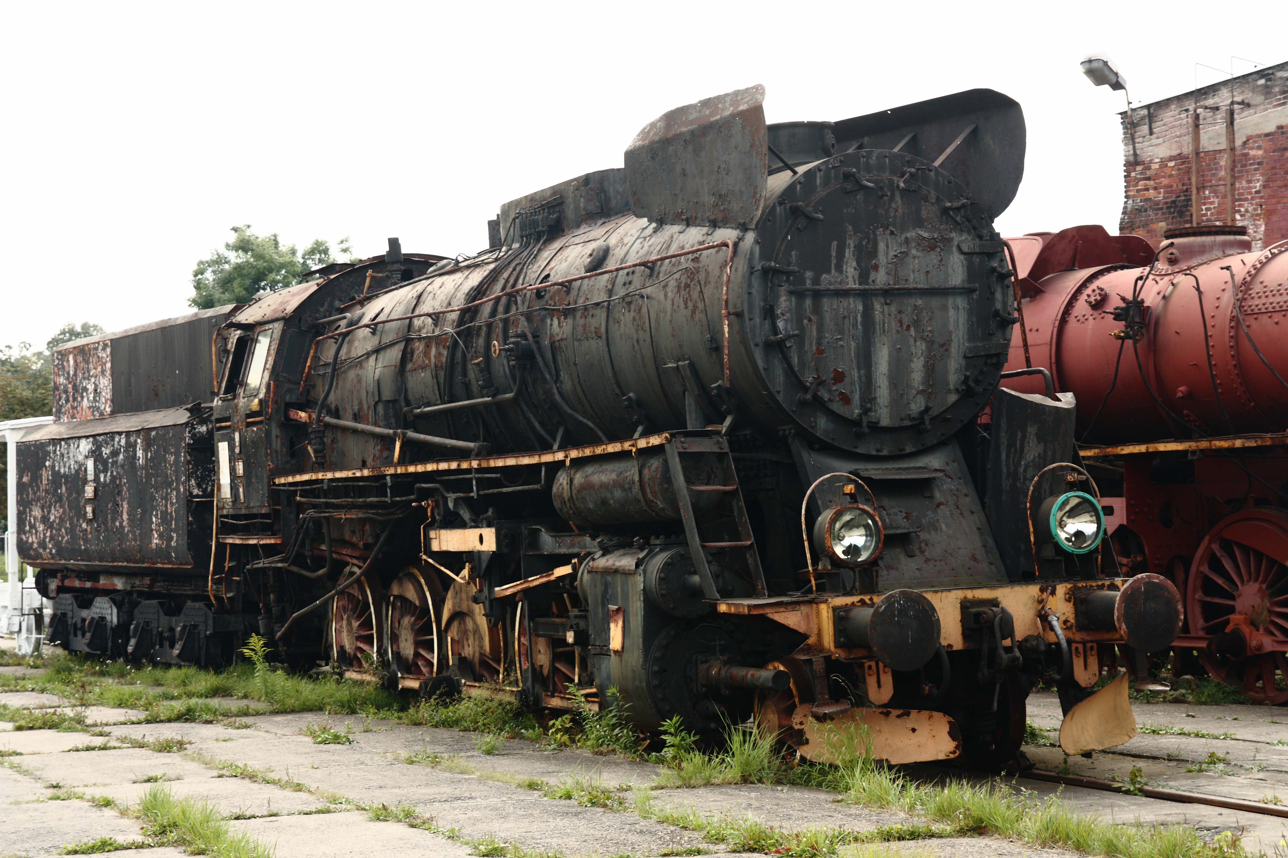 Ty51-1 w Parowozowni Skierniwice